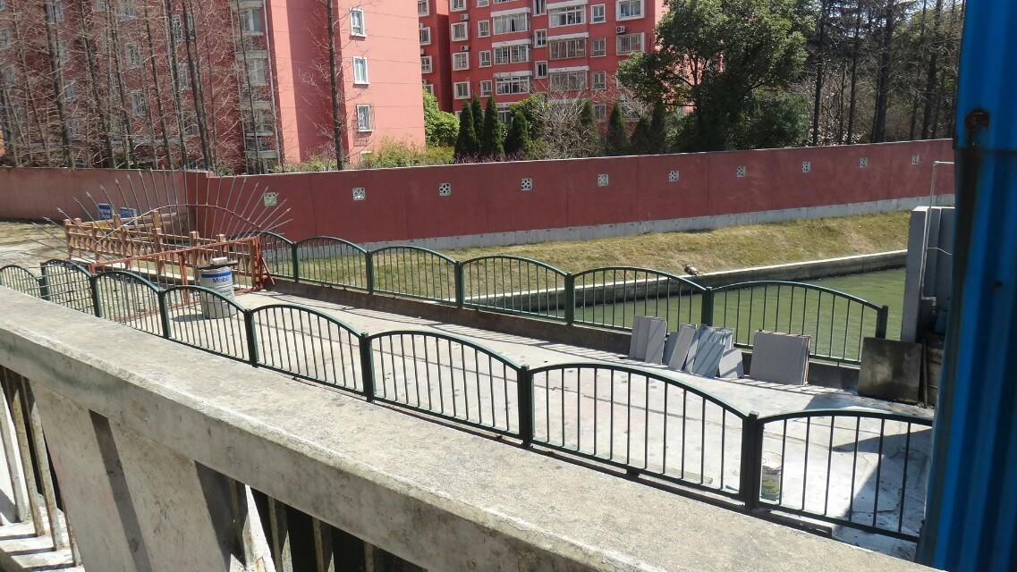 中文（中国大陆）: 沪杭铁路徐虹支线新泾港桥